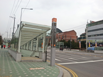 남동구청역 1번 출입구